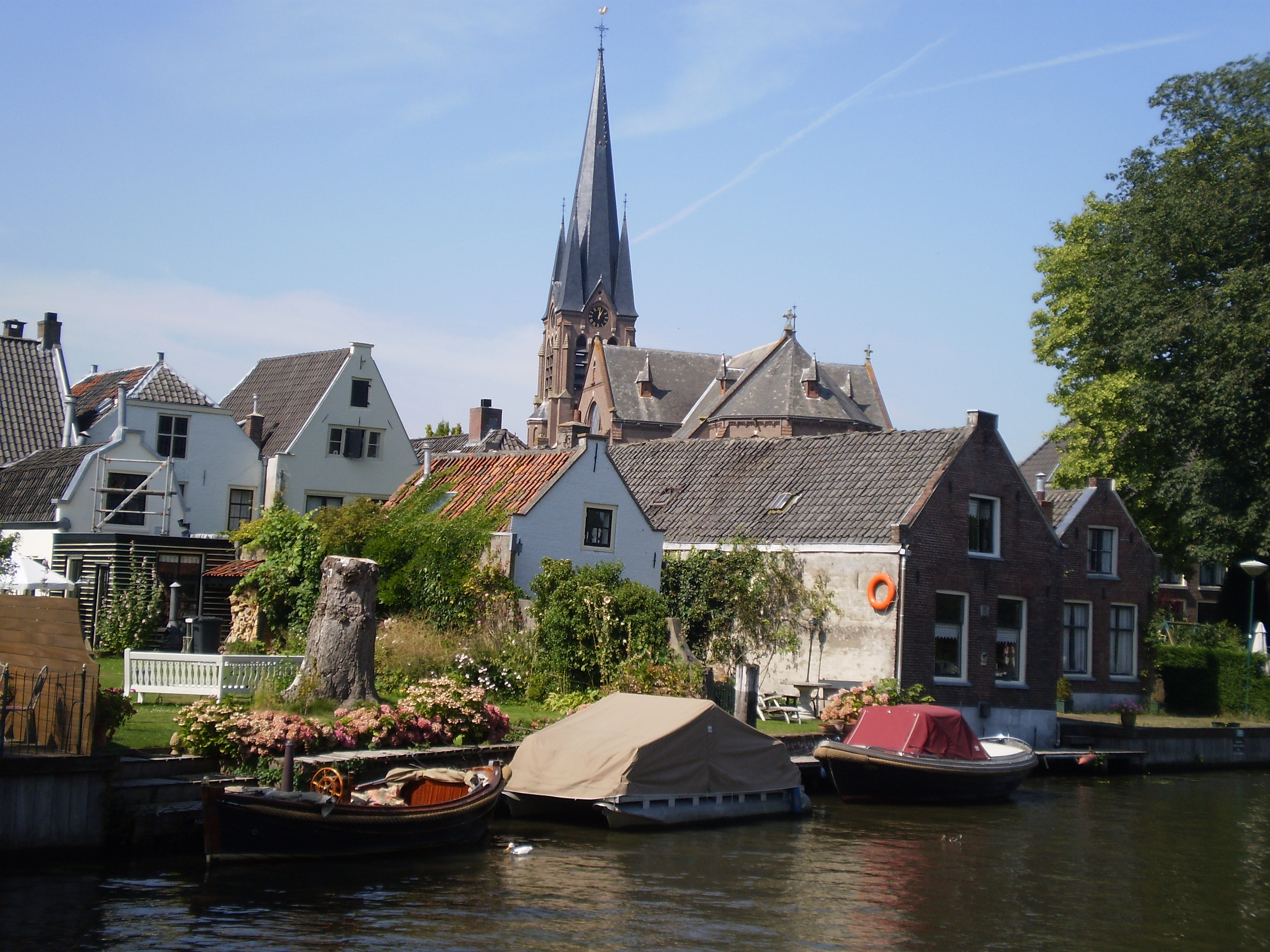 Breukelen met oa Johannes de Doperkerk